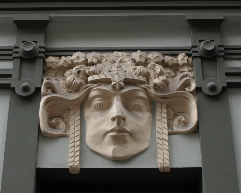 Sóc l'autora